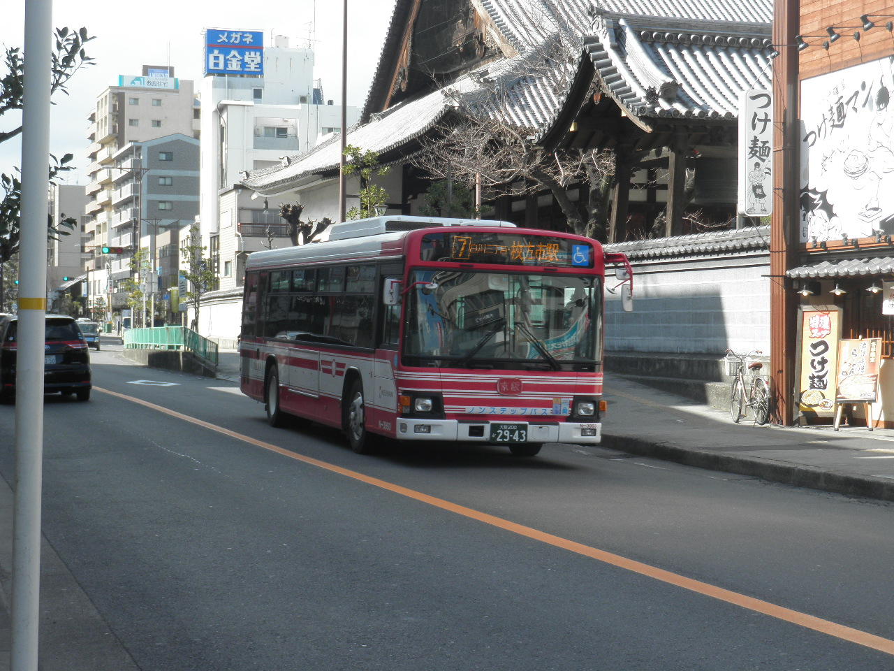 枚方茨木線のバス